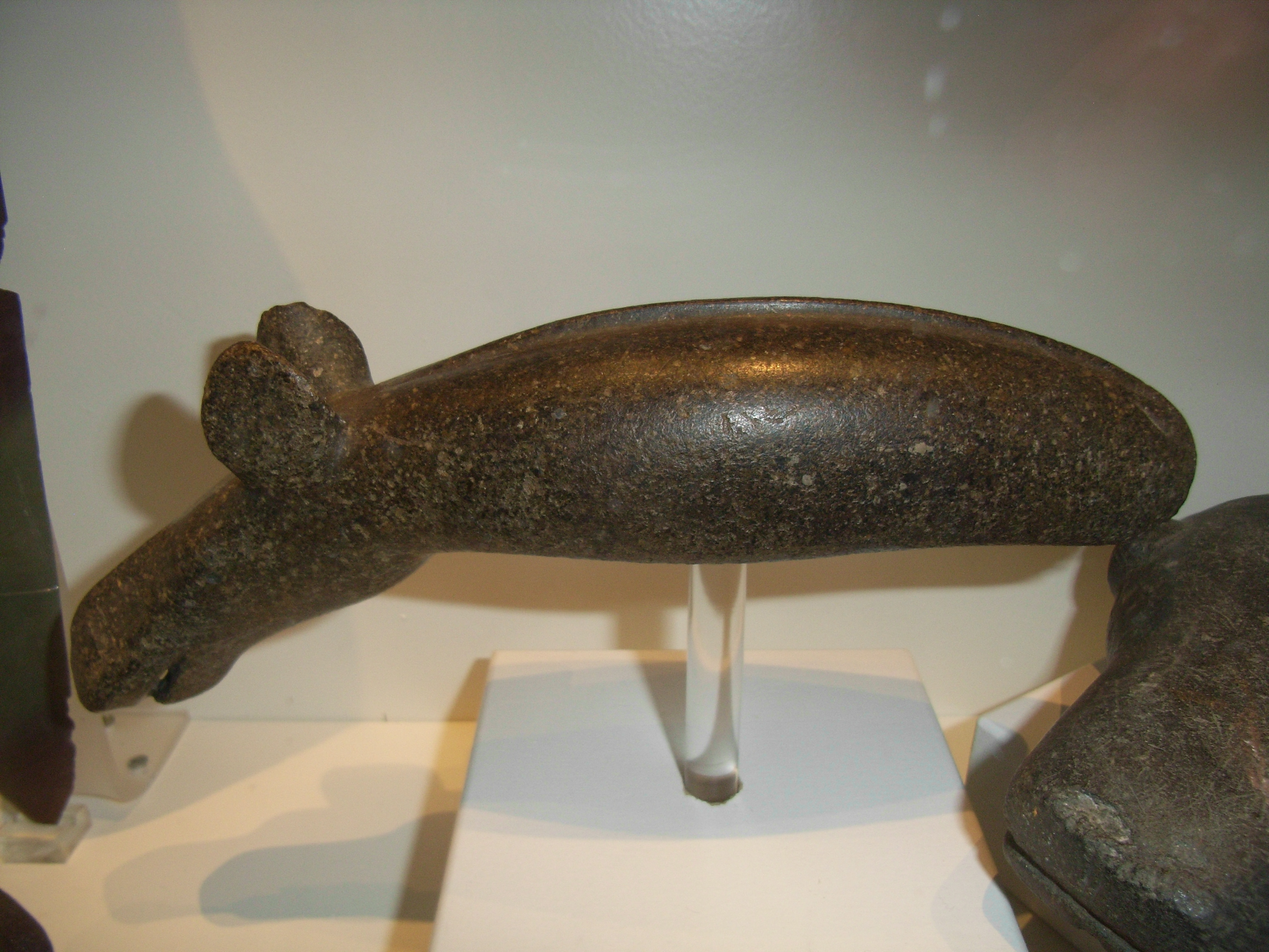 Alunda Elk